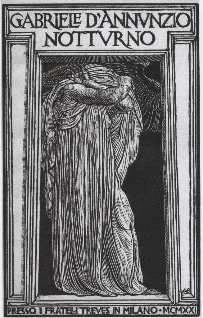 Adolfo de Carolis copertina de Il Notturno di D'Annunzio